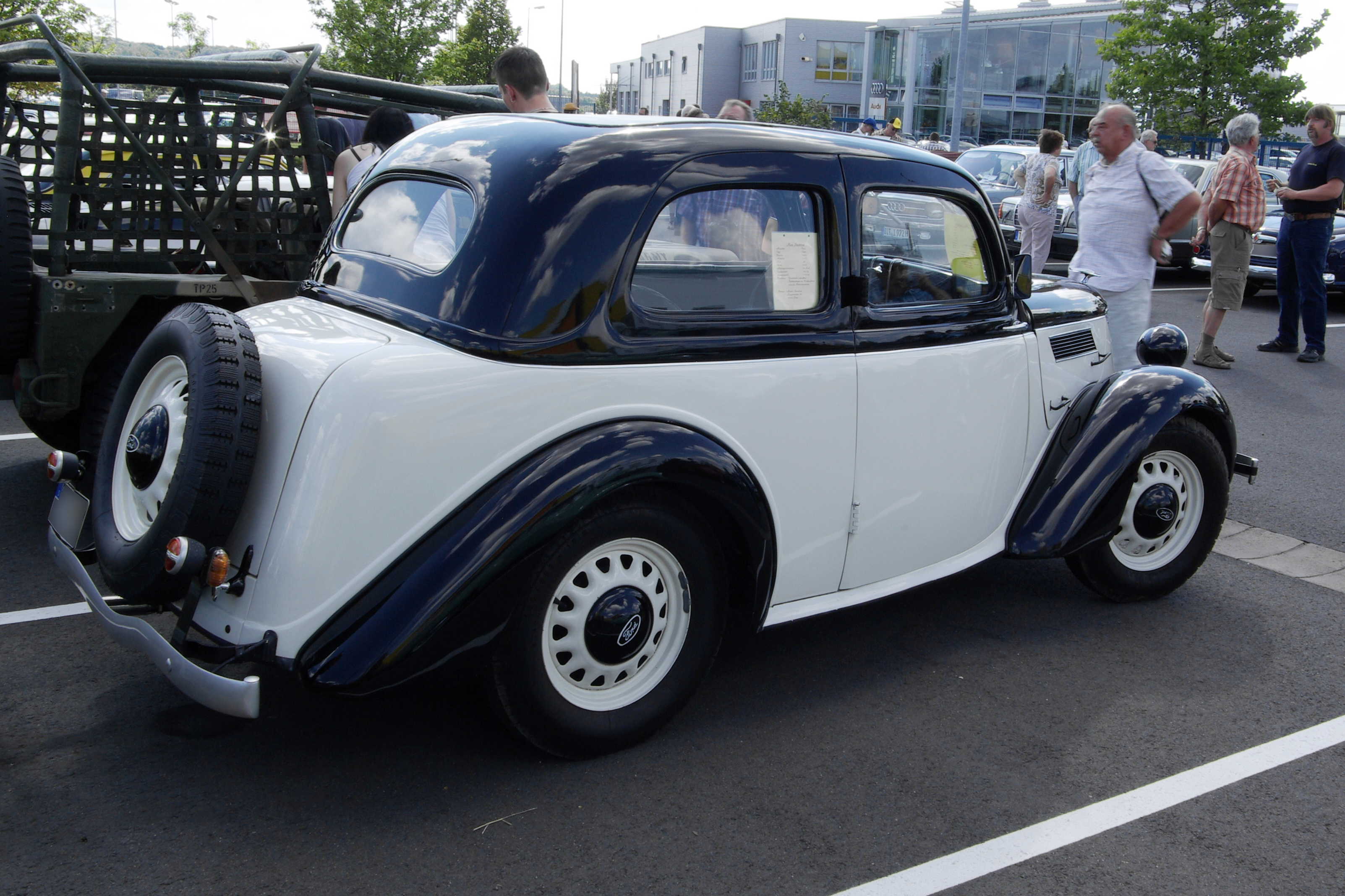 Ford Eifel, Baujahr 1938, 1157 cm³, 34 PS Bitburg Classics 2011